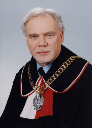 Marek Safjan, sędzia, w latach 1998–2006 prezes Trybunału Konstytucyjnego.